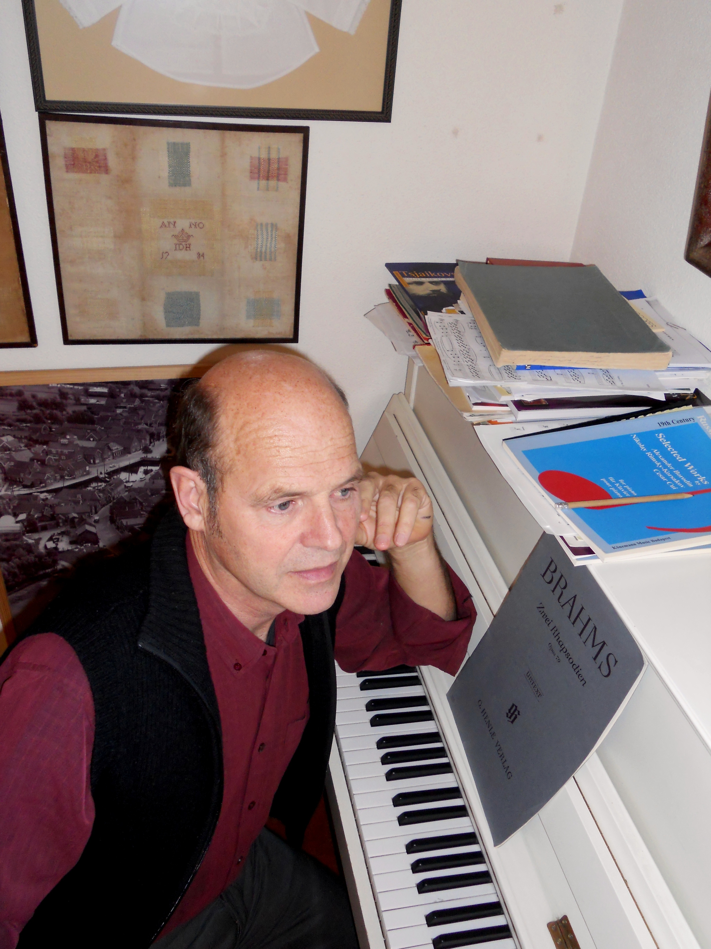 Willem van Twillert aan de piano in zijn woning.